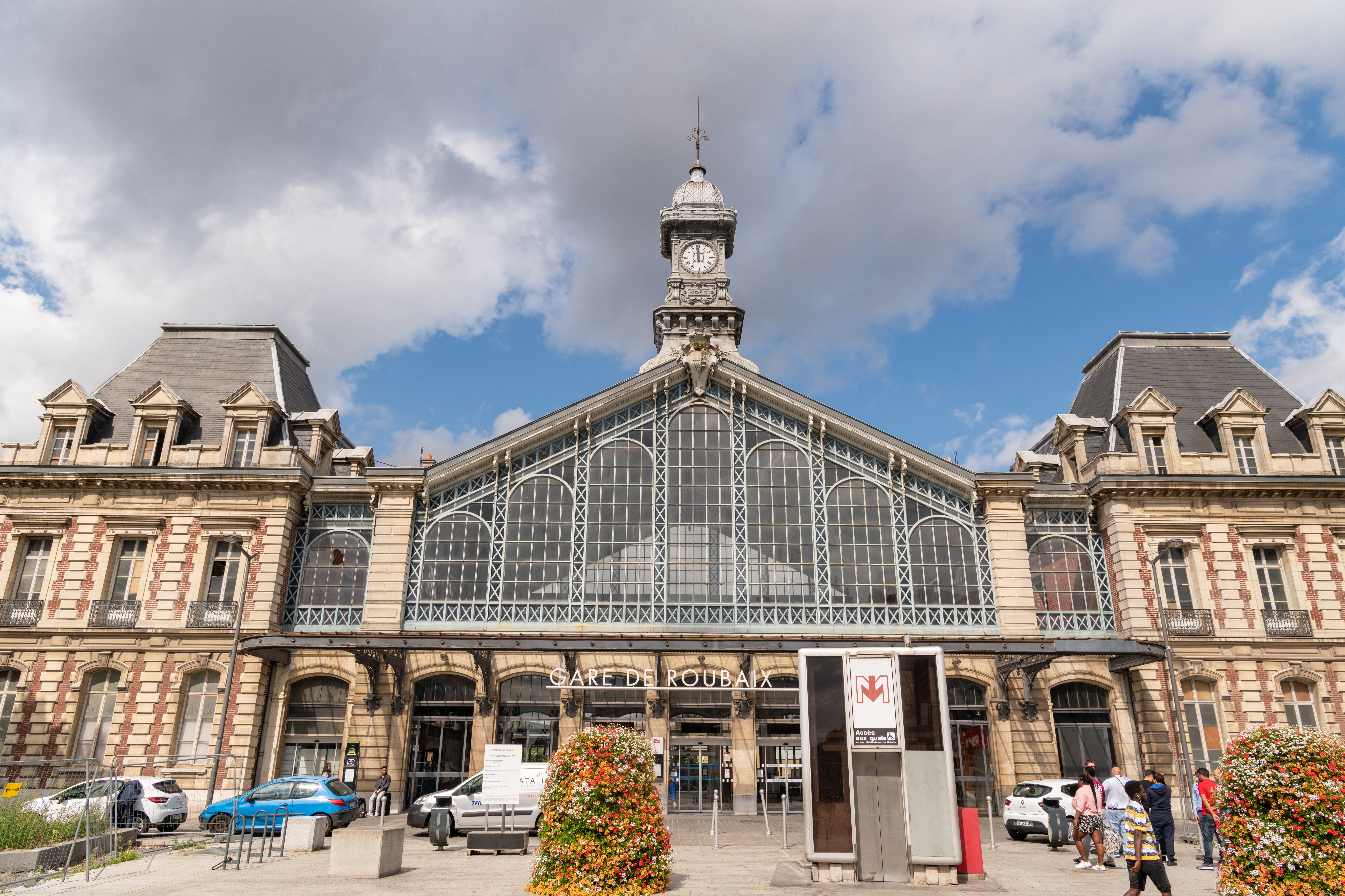 La gare de Roubaix situee dans le quartier de l'Alma. Transport ferroviaire. Avenue Jean Lebas.